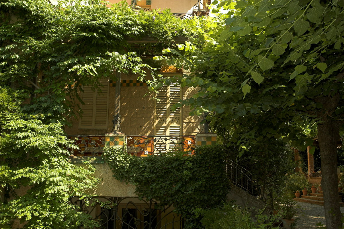 Casa Juli Barber i Poinsard (la Garriga-Vallès Oriental-Catalunya), obra de Joaquim Raspall 1910. Vegetació al jardí.